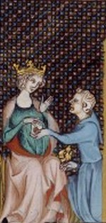 Isabelle de Navarre et le messager de Louis IX